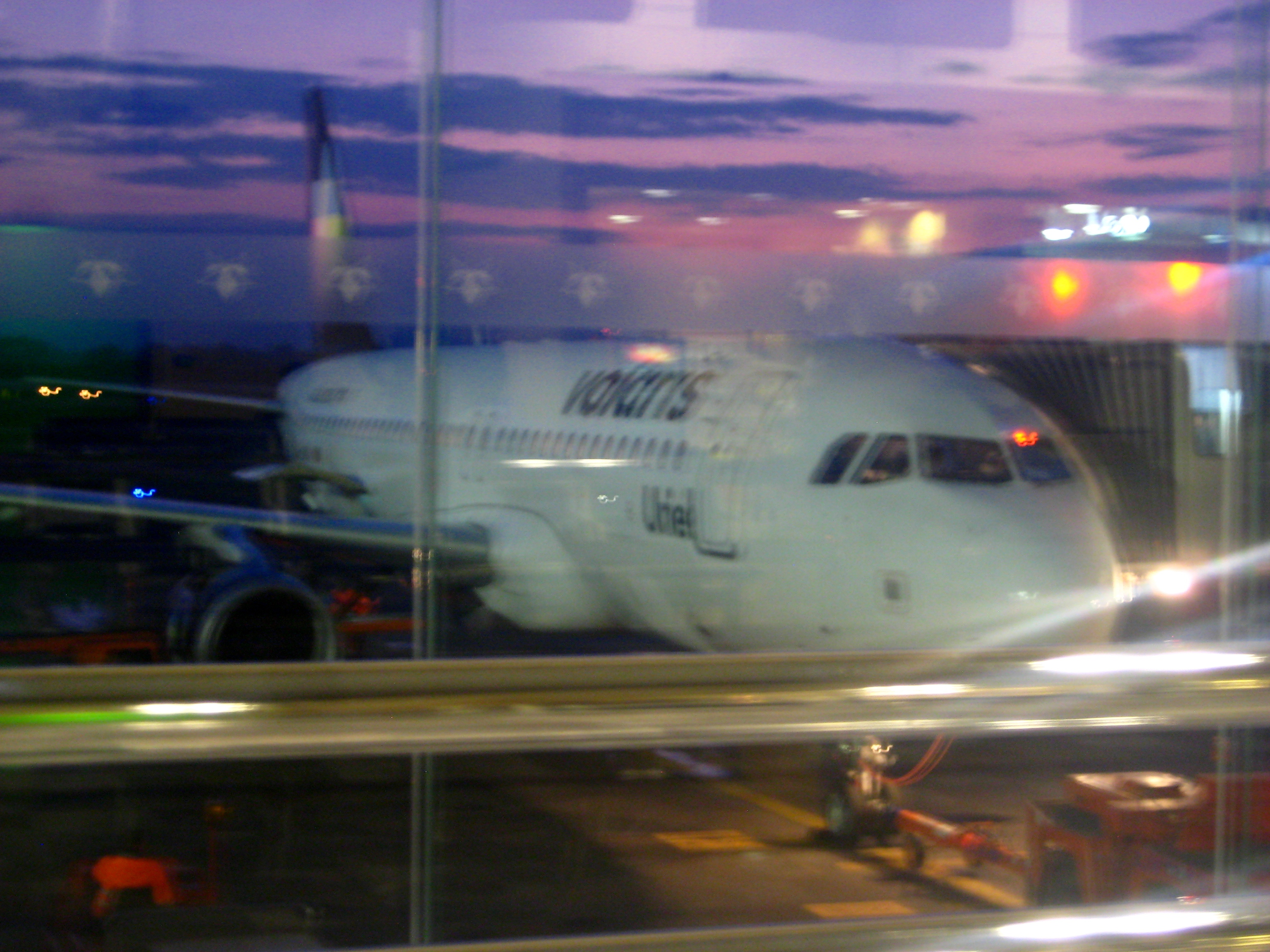 Volaris Vuelo 401 abordando pasajeros con destino a la ciudad de Tijuana, BC, origen Leon, Guanajuato.